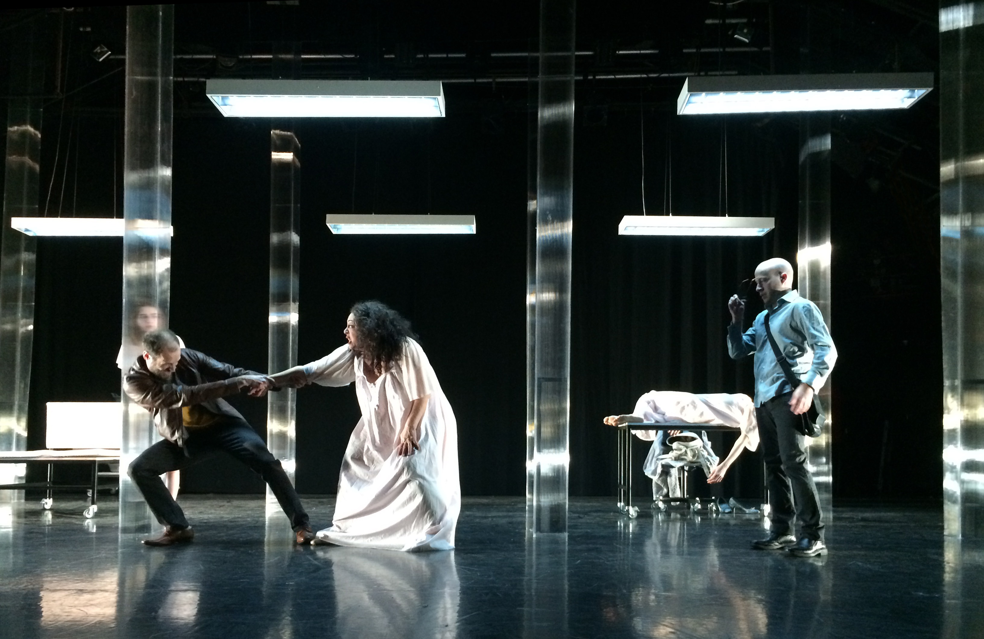 'מתוך ההצגה האזרח ק. נעמה שפירא, איל זוסמן, יוסף אלבלק, מיכל ויינברג ועמית דרוקר בהצגה "האזרח ק'", 2015.